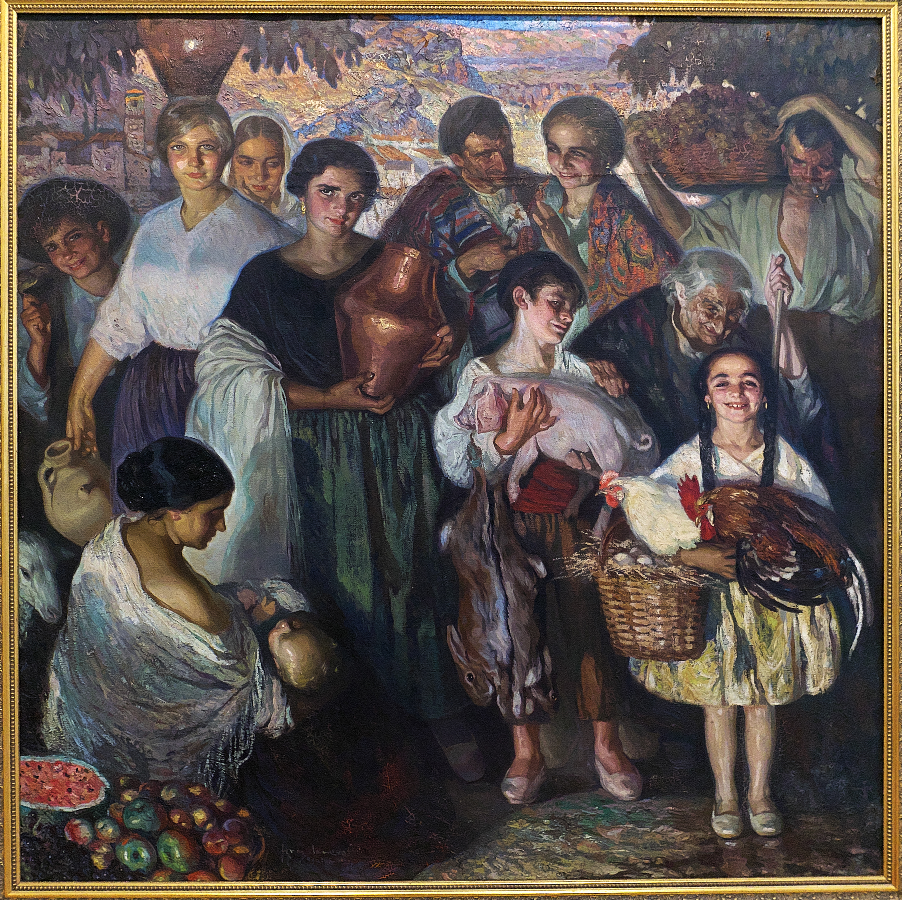 Museo del Prado. Óleo sobre lienzo.